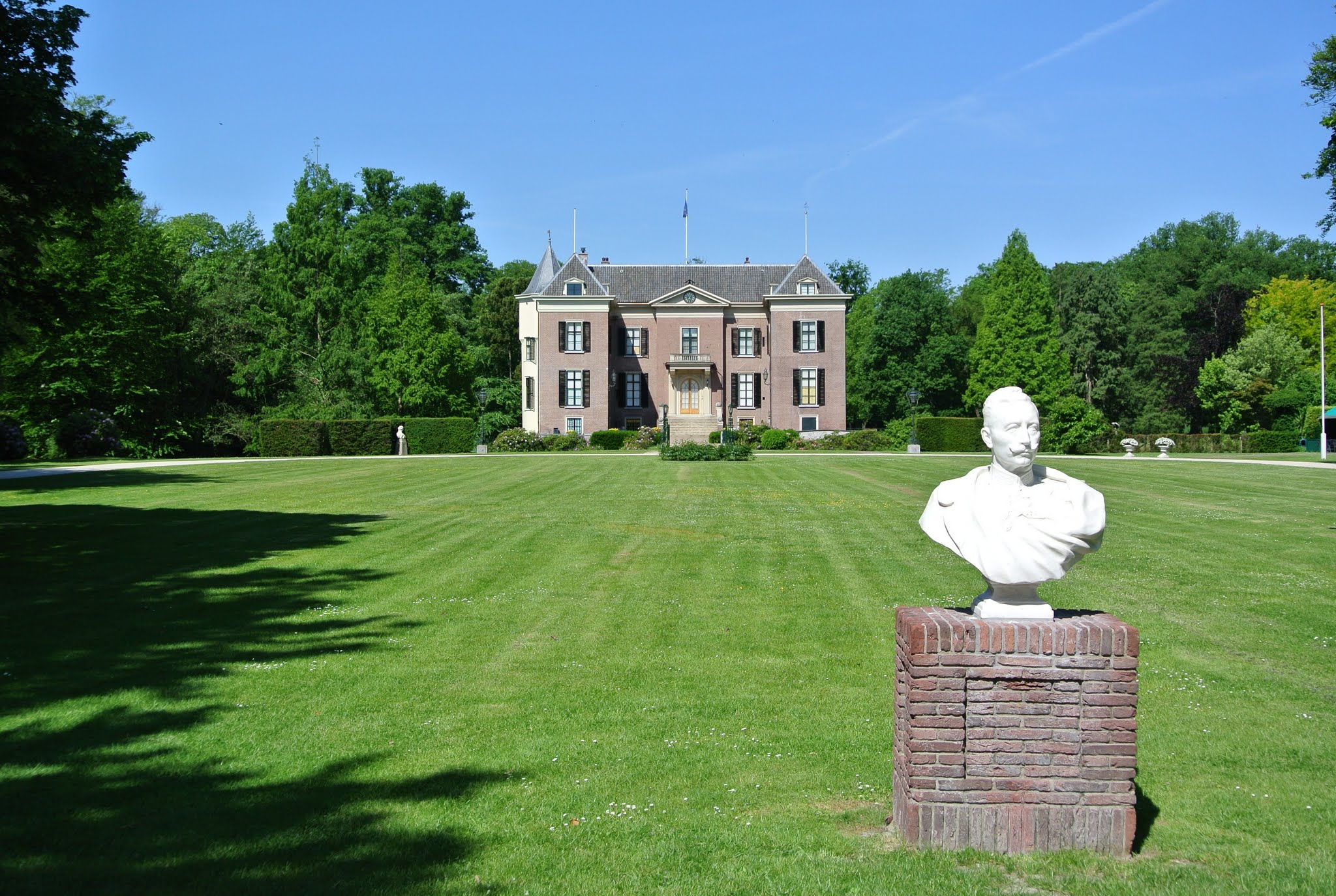 3941 Doorn, Netherlands